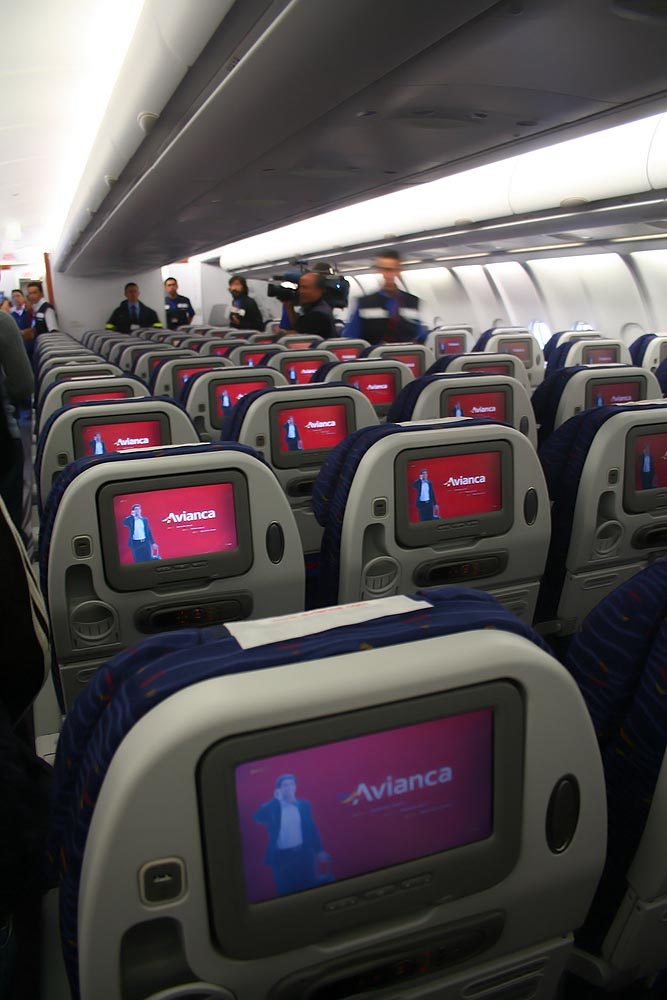 Nuevo sistema de entretenimiento en clase económica del Airbus A330